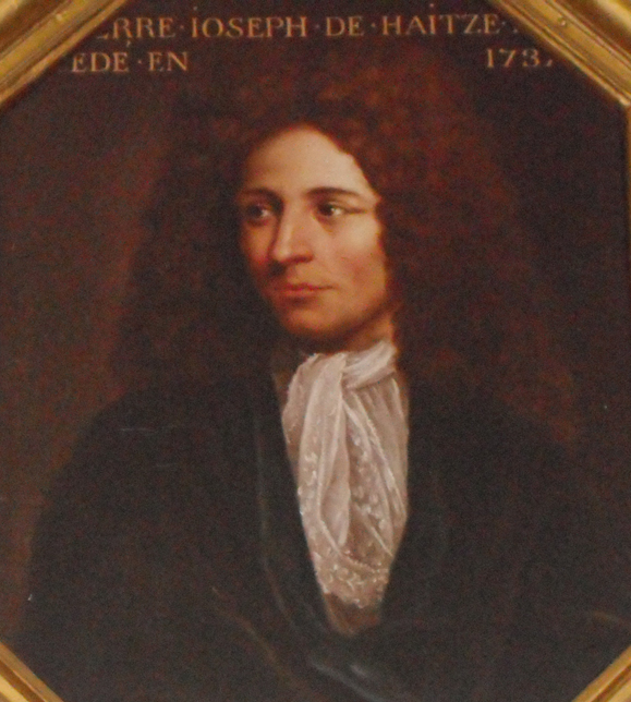 Portrait de Pierre-Joseph de Haitze, par Joseph Villevieille